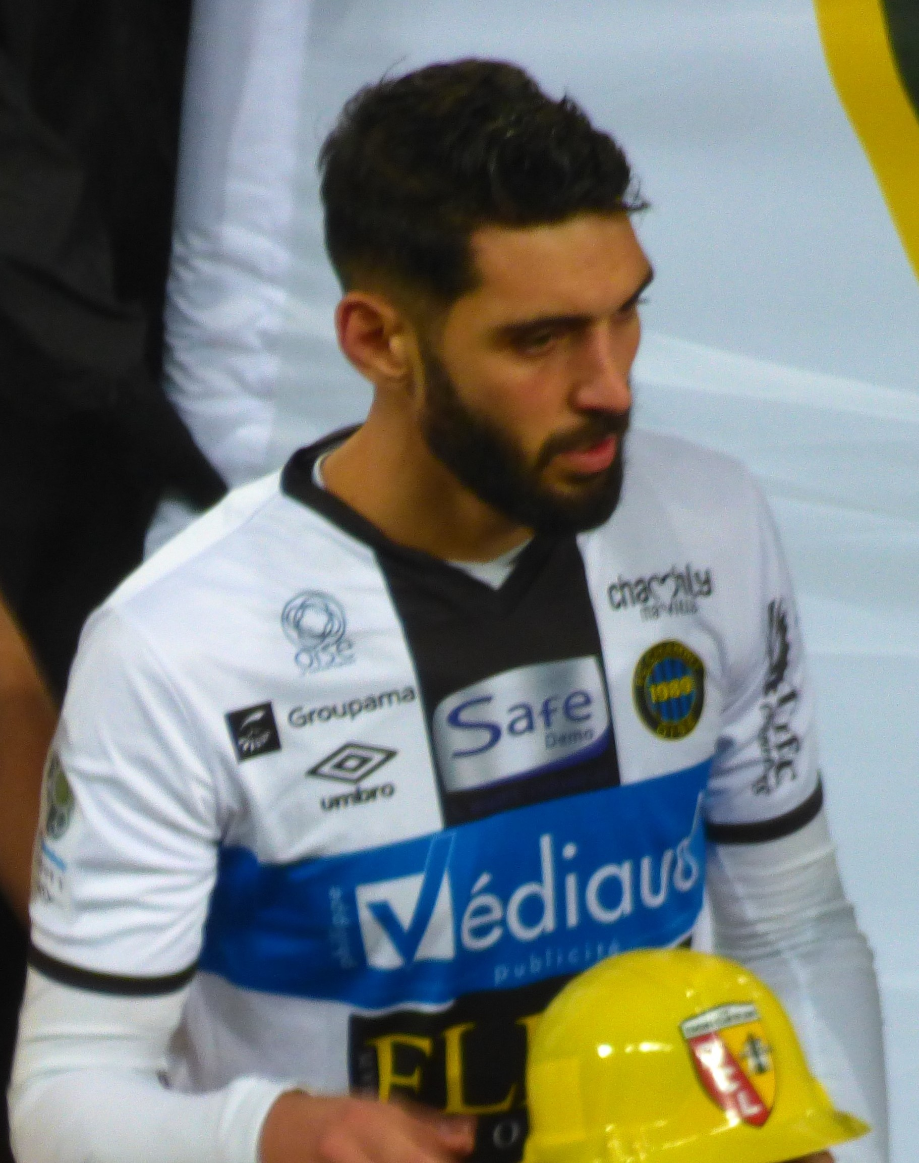 Guillaume Dequaire avant le match Lens - Chambly, comptant pour la dix-septième journée du championnat de France de football de Ligue 2 2019-2020, le 3 décembre 2019.